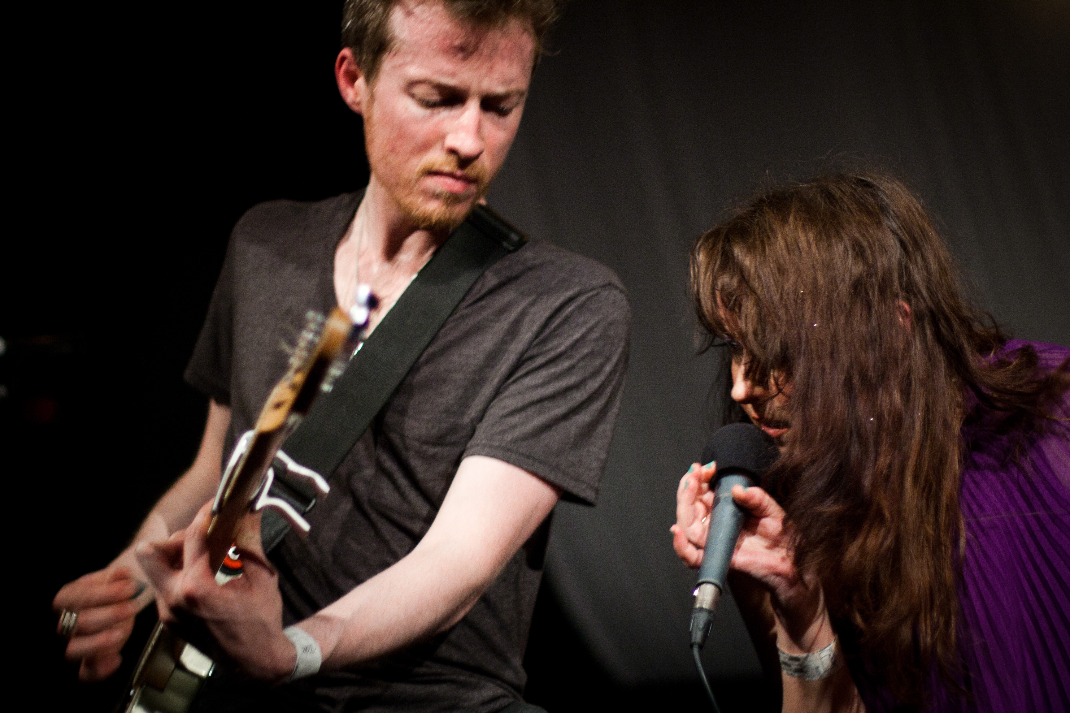 Scott Paterson et Adele Bethel des Sons and Daughters au Stag and Dagger 2011.